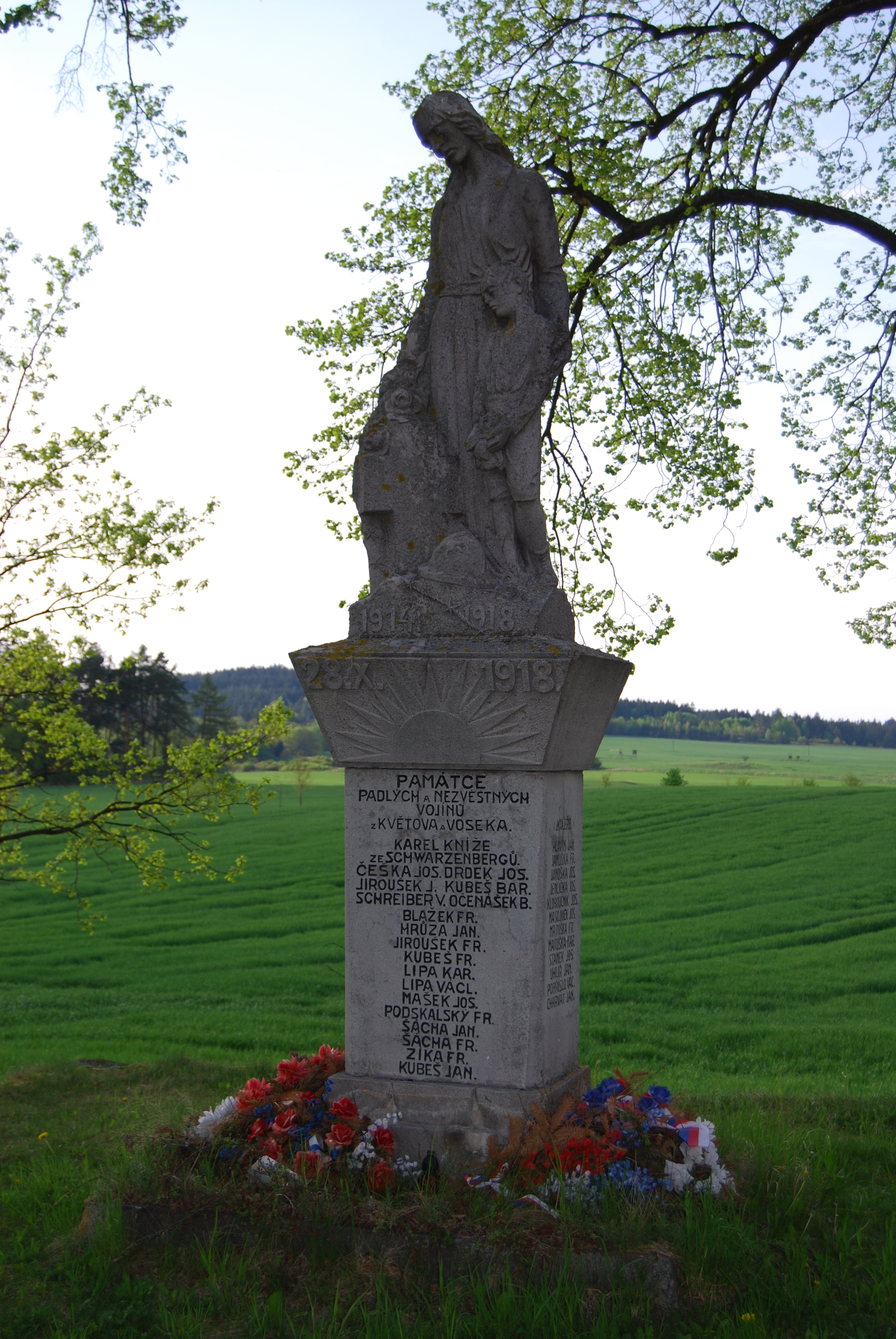 Pomník padlým spoluobčanům v I. světové válce u kostela svatého Jana Křtitele. Svatý Jan (Květov). Okres Písek. Česká republika.